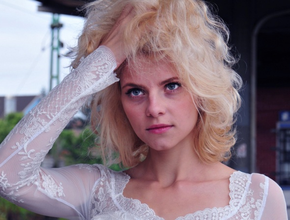 Jakab Juli magyar színésznő, forgatókönyvíró.